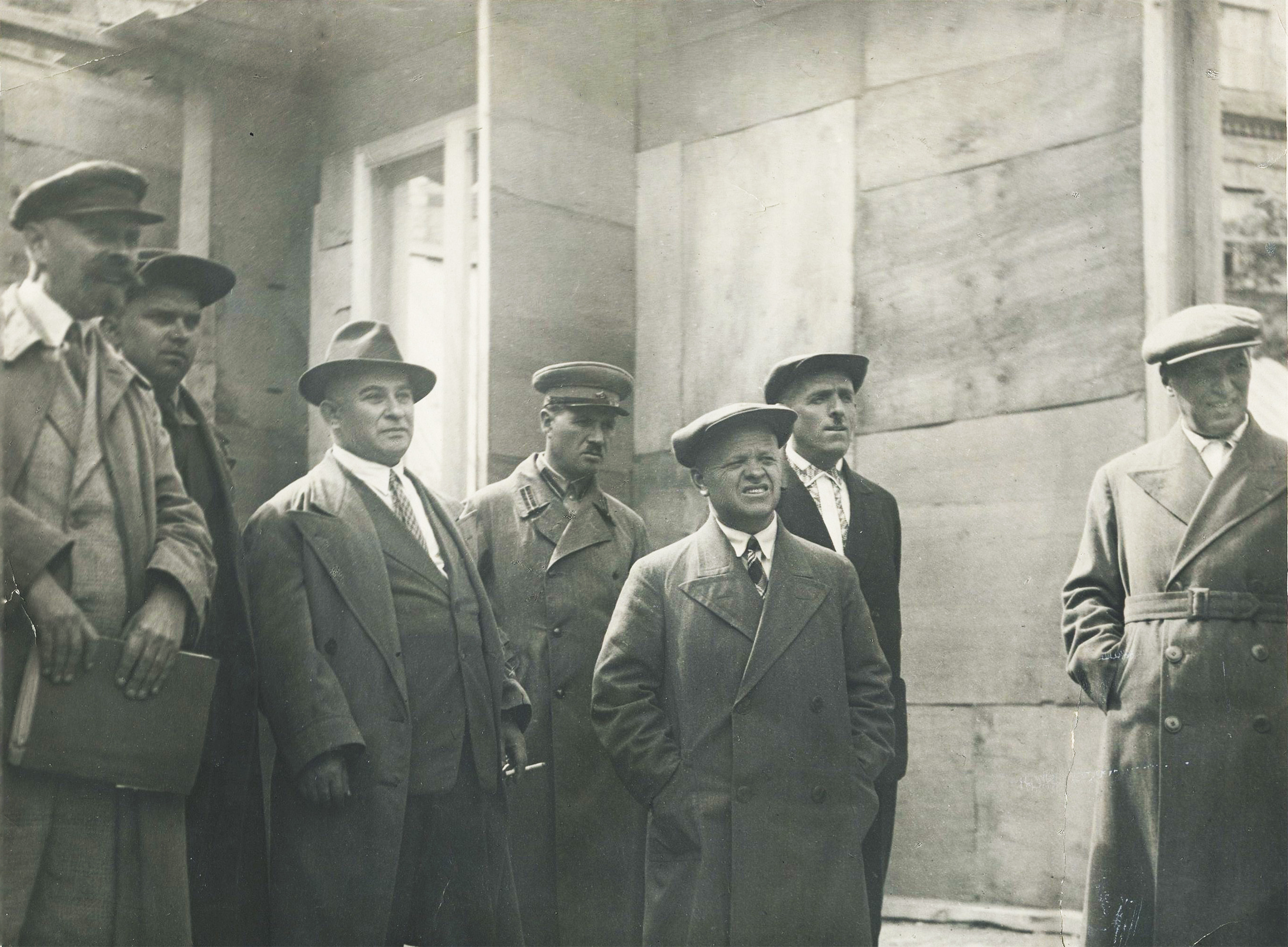 Йосип Лангбард (третій зліва) з урядовцями на будівництві будівлі РНК УСРР у Києві. 1936 р.